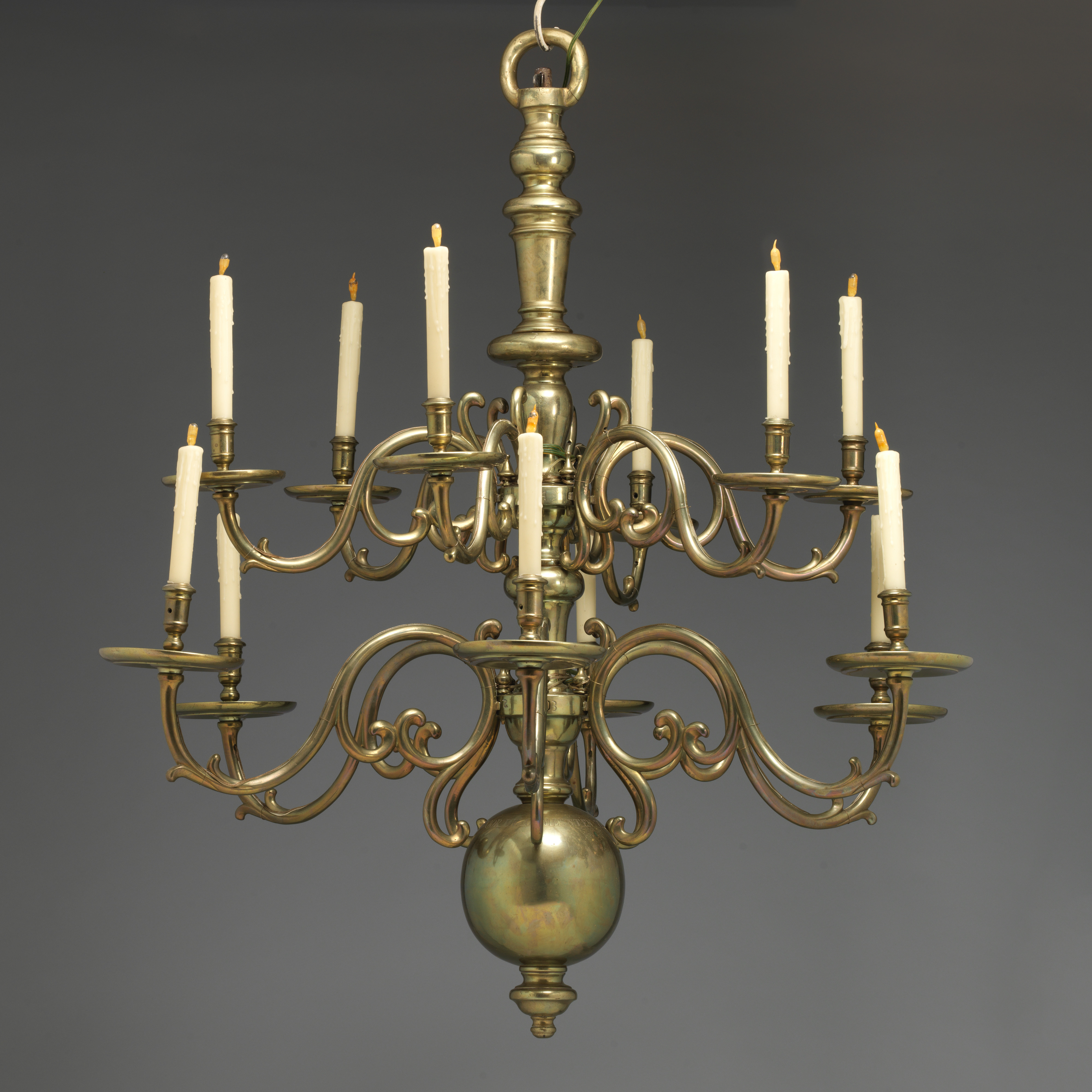 Dutch; Chandelier; Metalwork-Brass